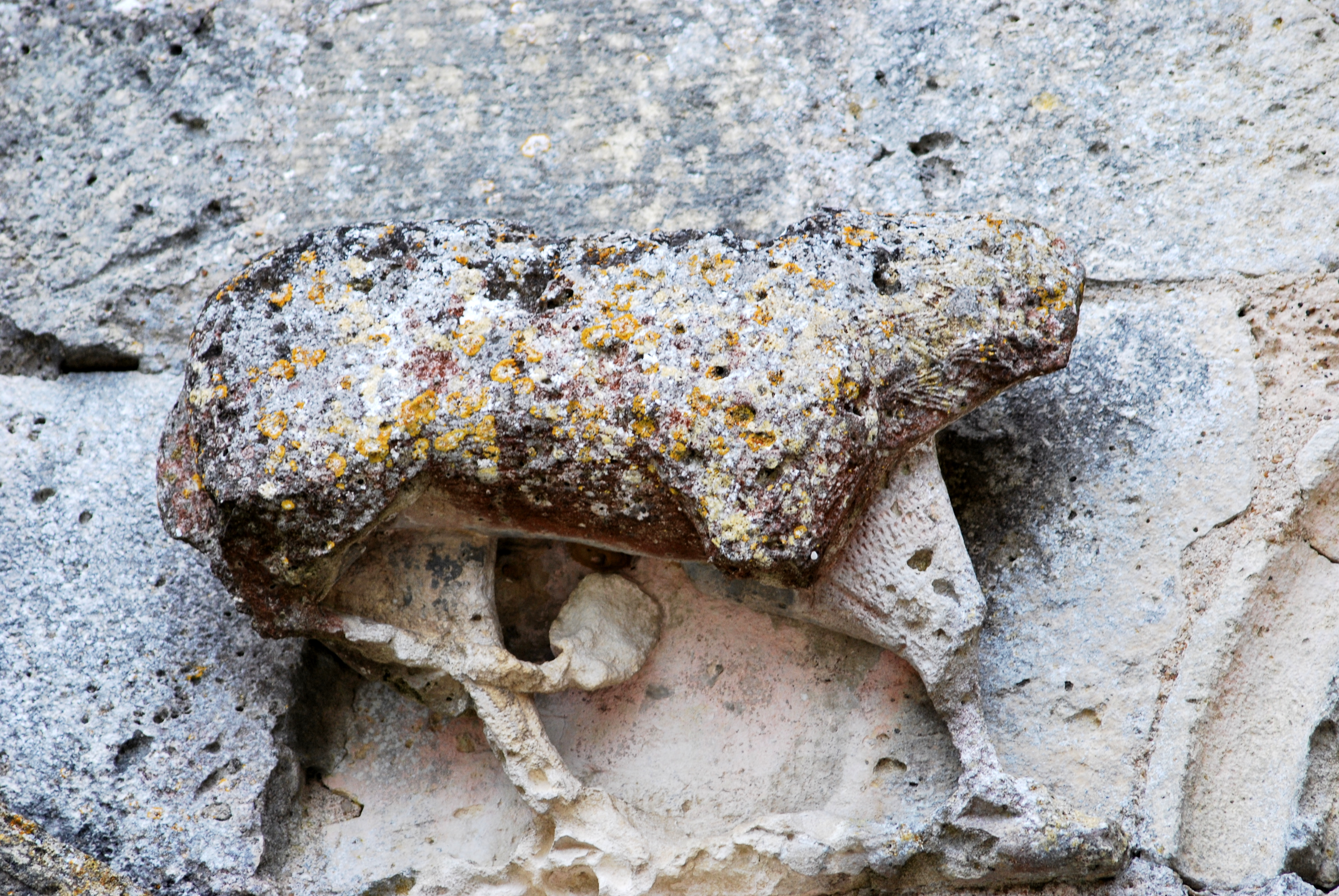 Haux église St Martin